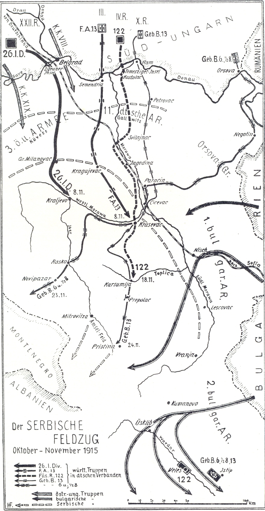 Karte Seite 46: Der Serbische Feldzug Oktober - November 1915